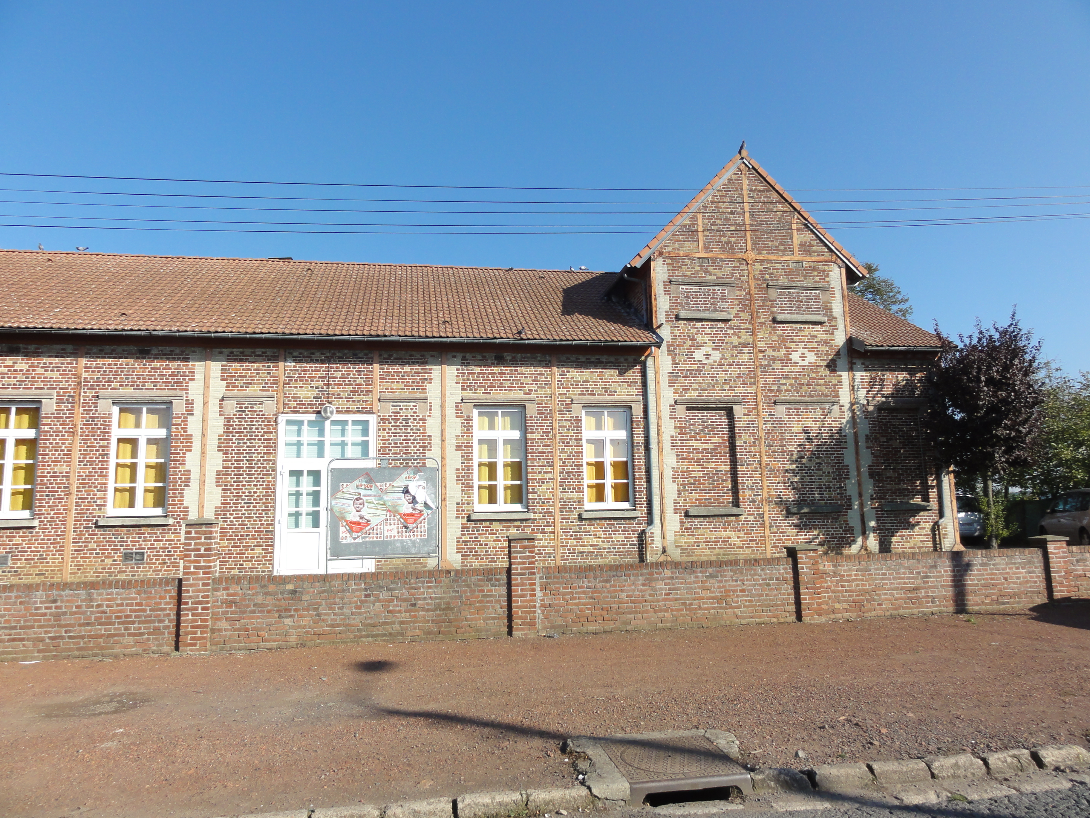 Salle Stanislas des cités de la Fosse n° 6 de la Compagnie des mines d'Ostricourt, Oignies, Pas-de-Calais, Nord-Pas-de-Calais, France.